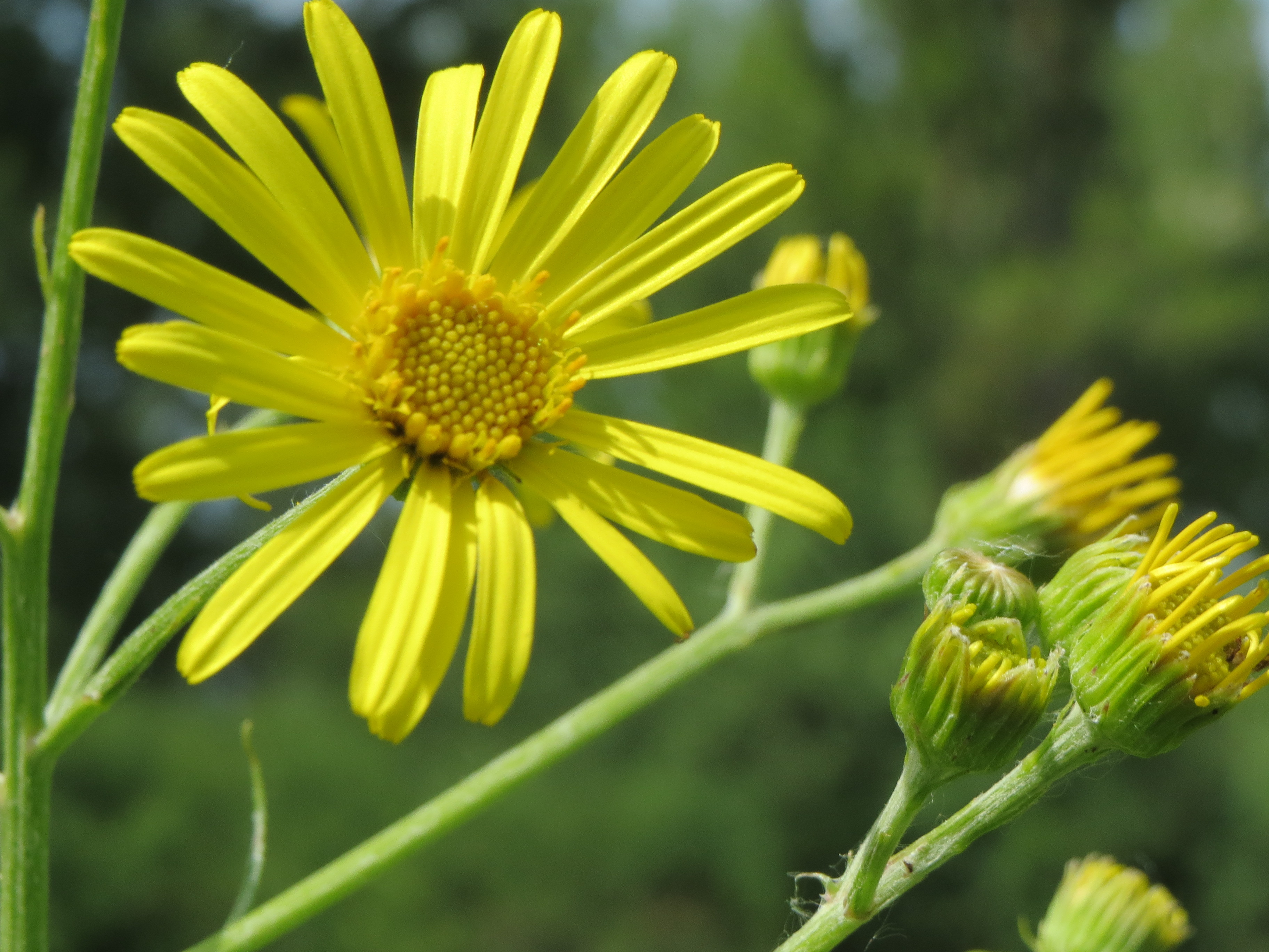 Sumpf-Greiskraut (Jacobaea paludosa) im Naturschutzgebiet Schwetzinger Wiesen-Riedwiesen